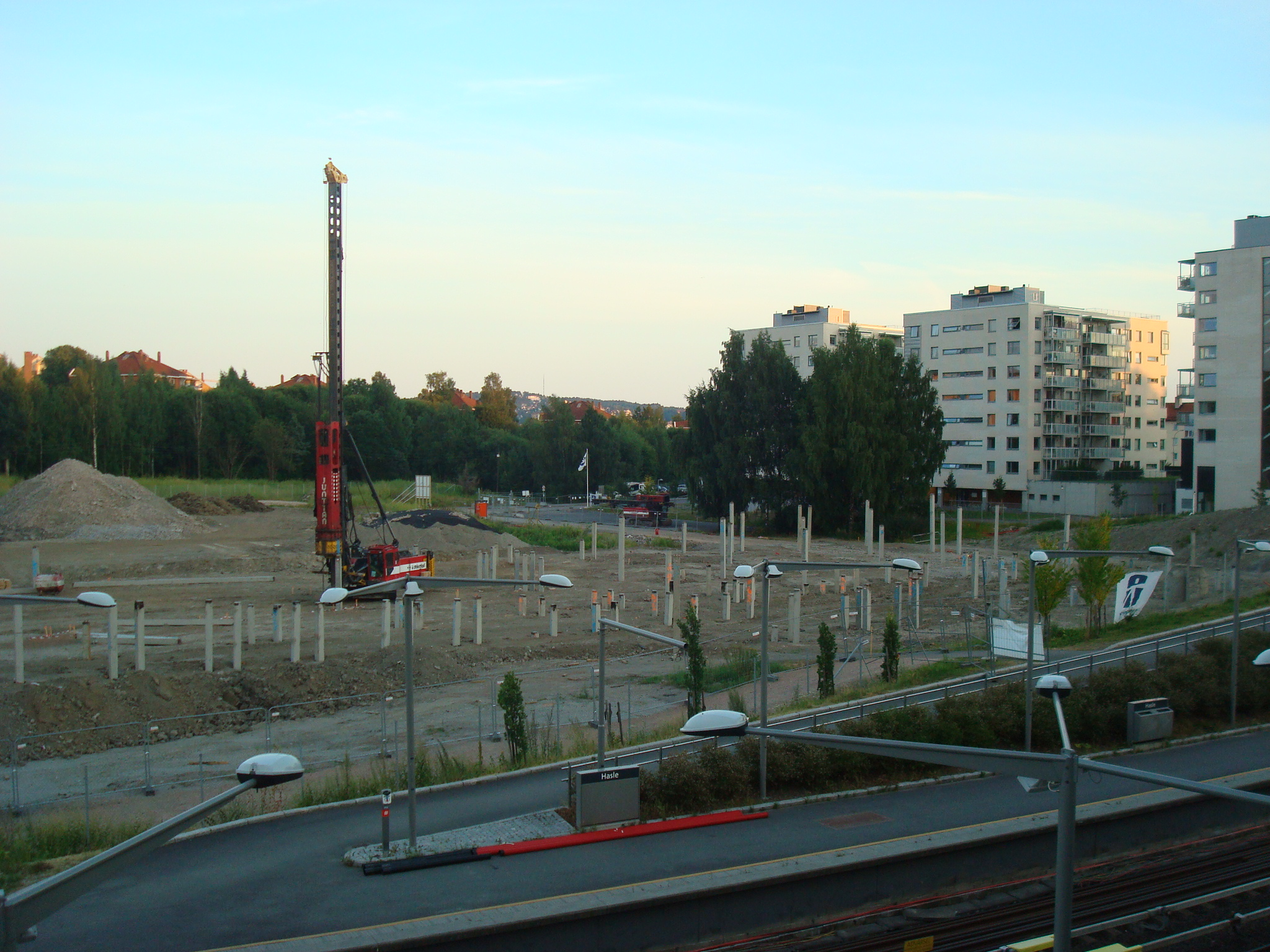 Teglverkstomta skole under bygging i juli 2013. I forgrunnen ses Hasle t-banestasjon og bebyggelse til høyre er Hasle torv.